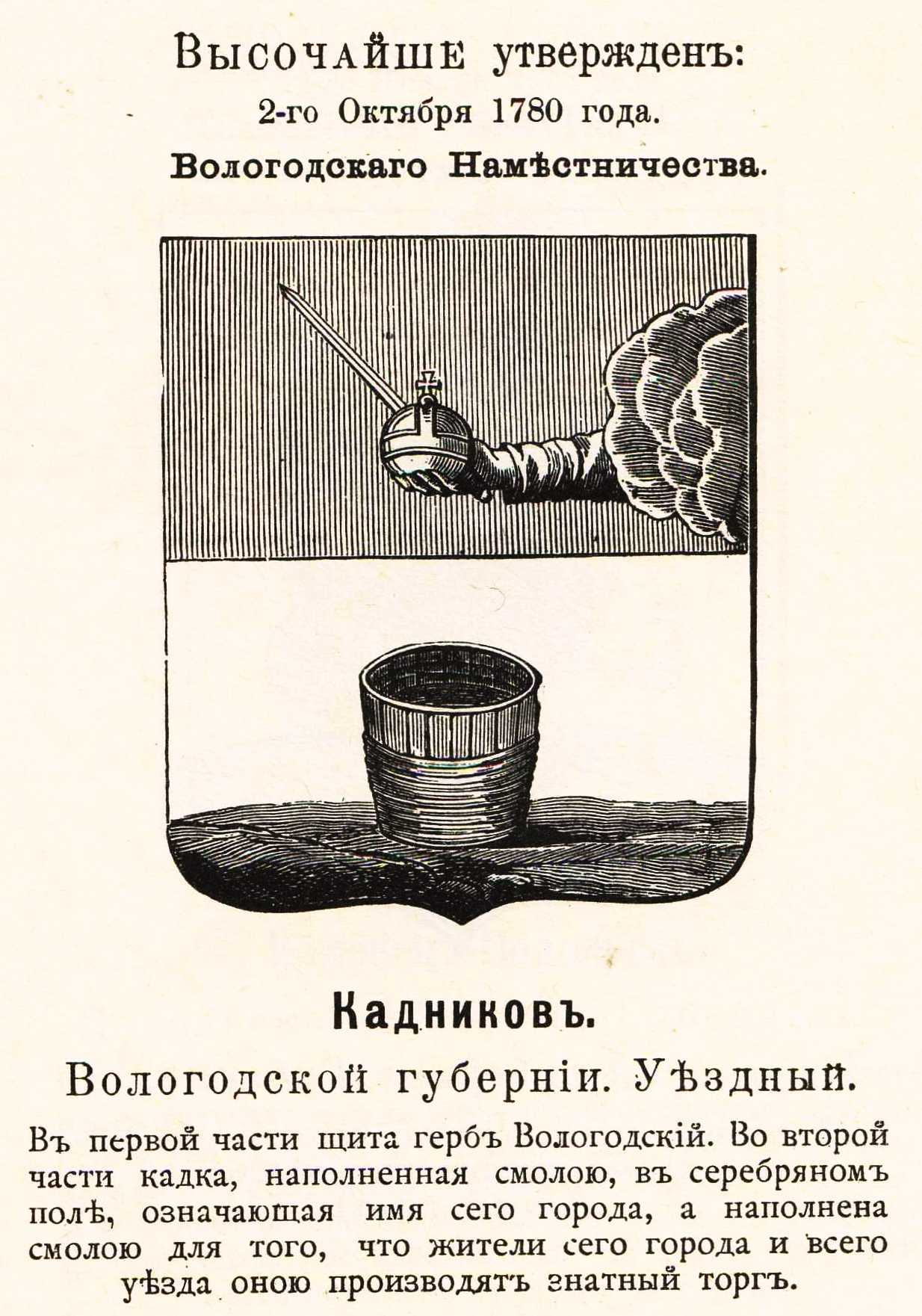 Official Russian Empire coat of arms Kadnikov. Гласный герб (кадка) Российской Империи уездного города Кадников Вологодской губернии с официальным описанием в Гербовнике Винклера.